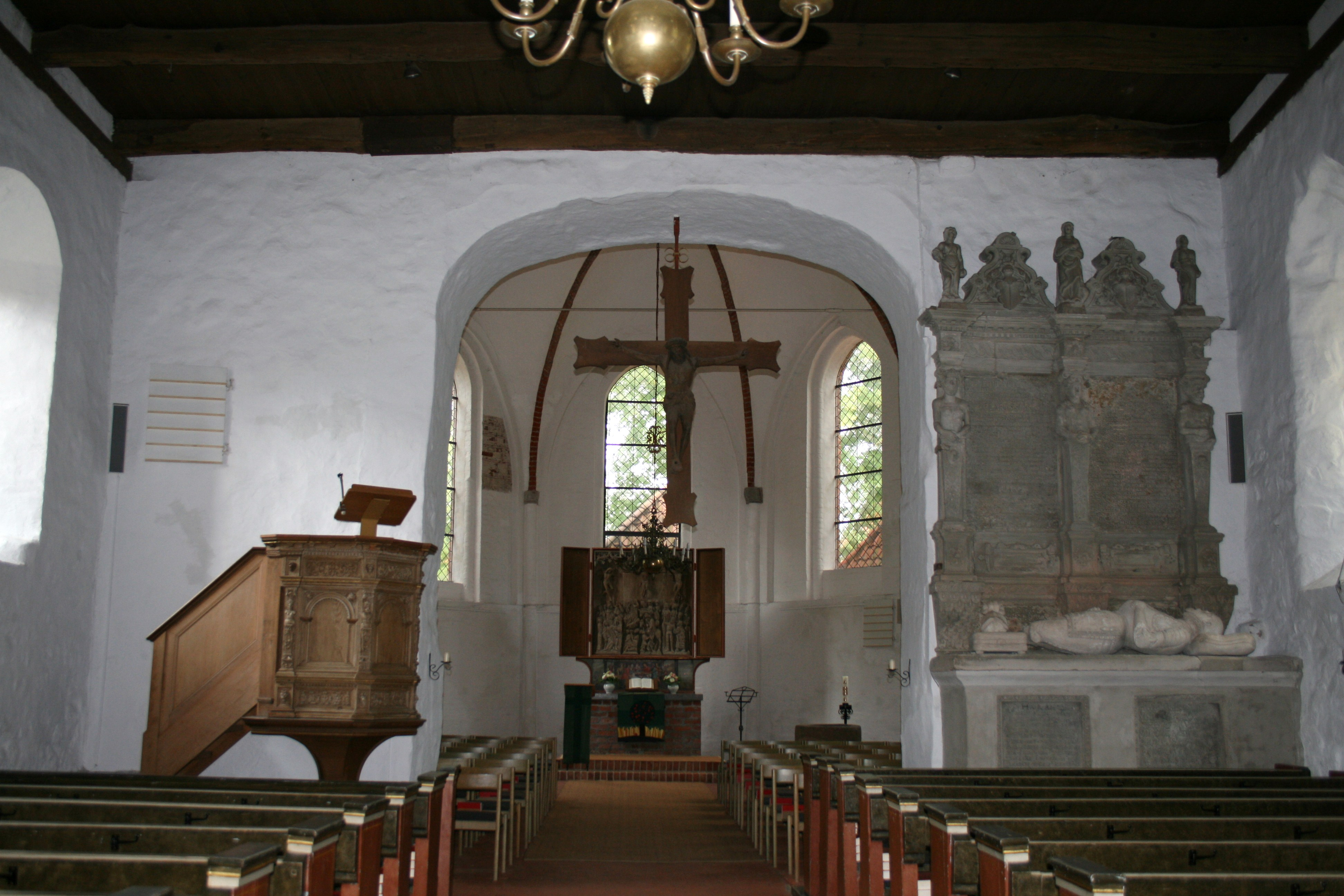 Innenraum der Catharinenkirche Westensee (Schleswig-Holstein)